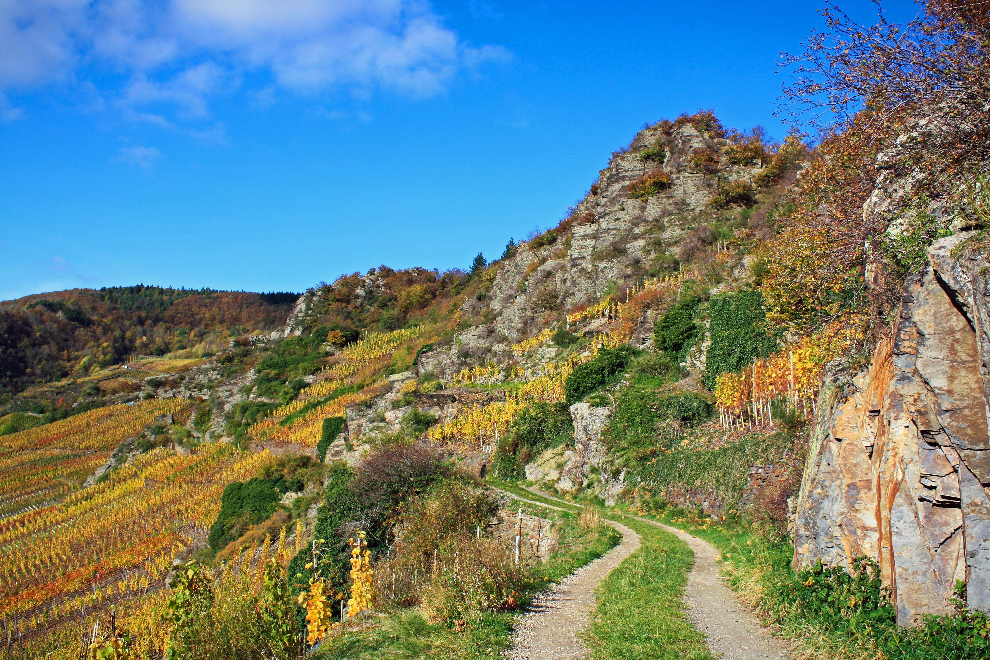 Herbst bei Laach